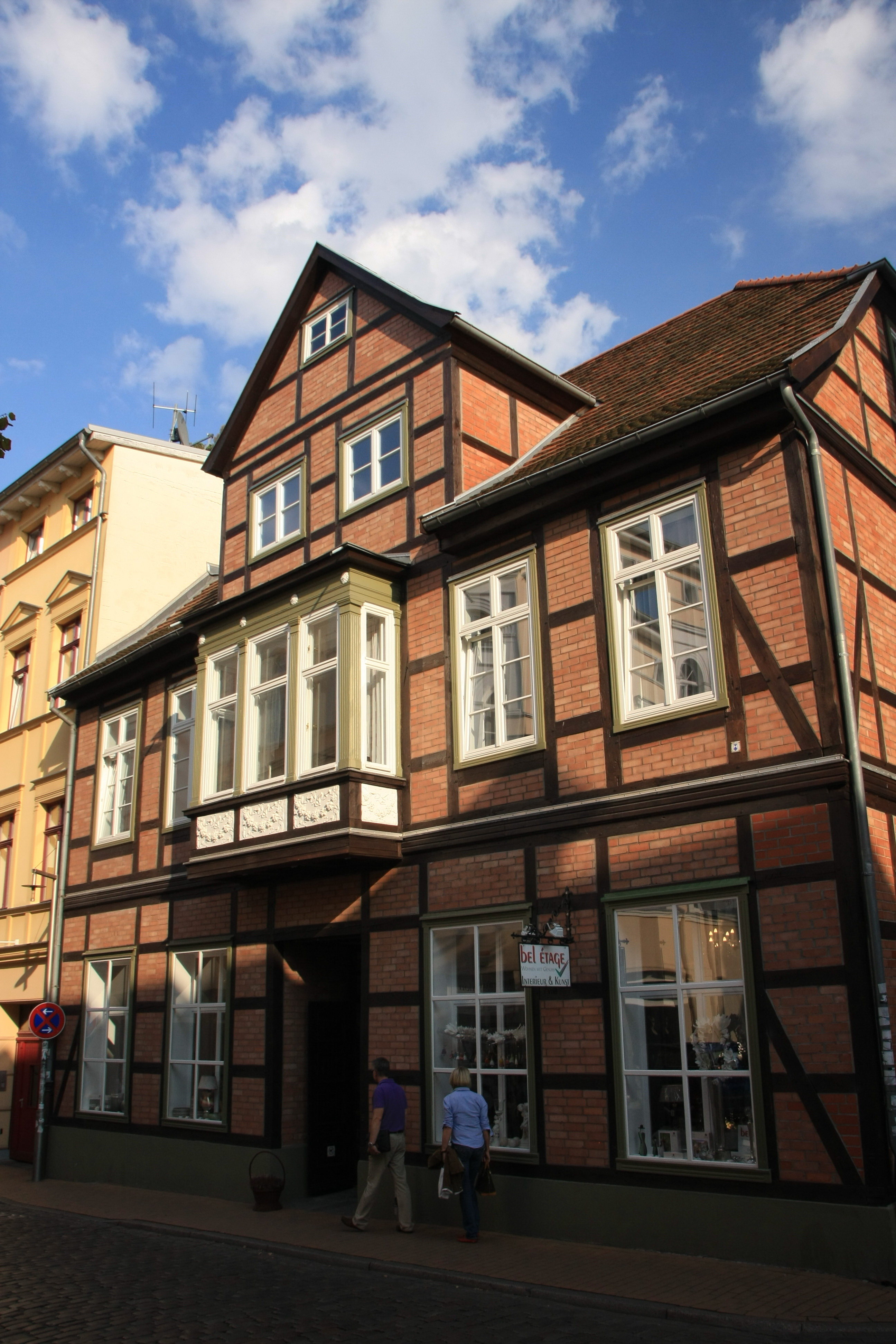 19055 Schwerin, Puschkinstraße 42